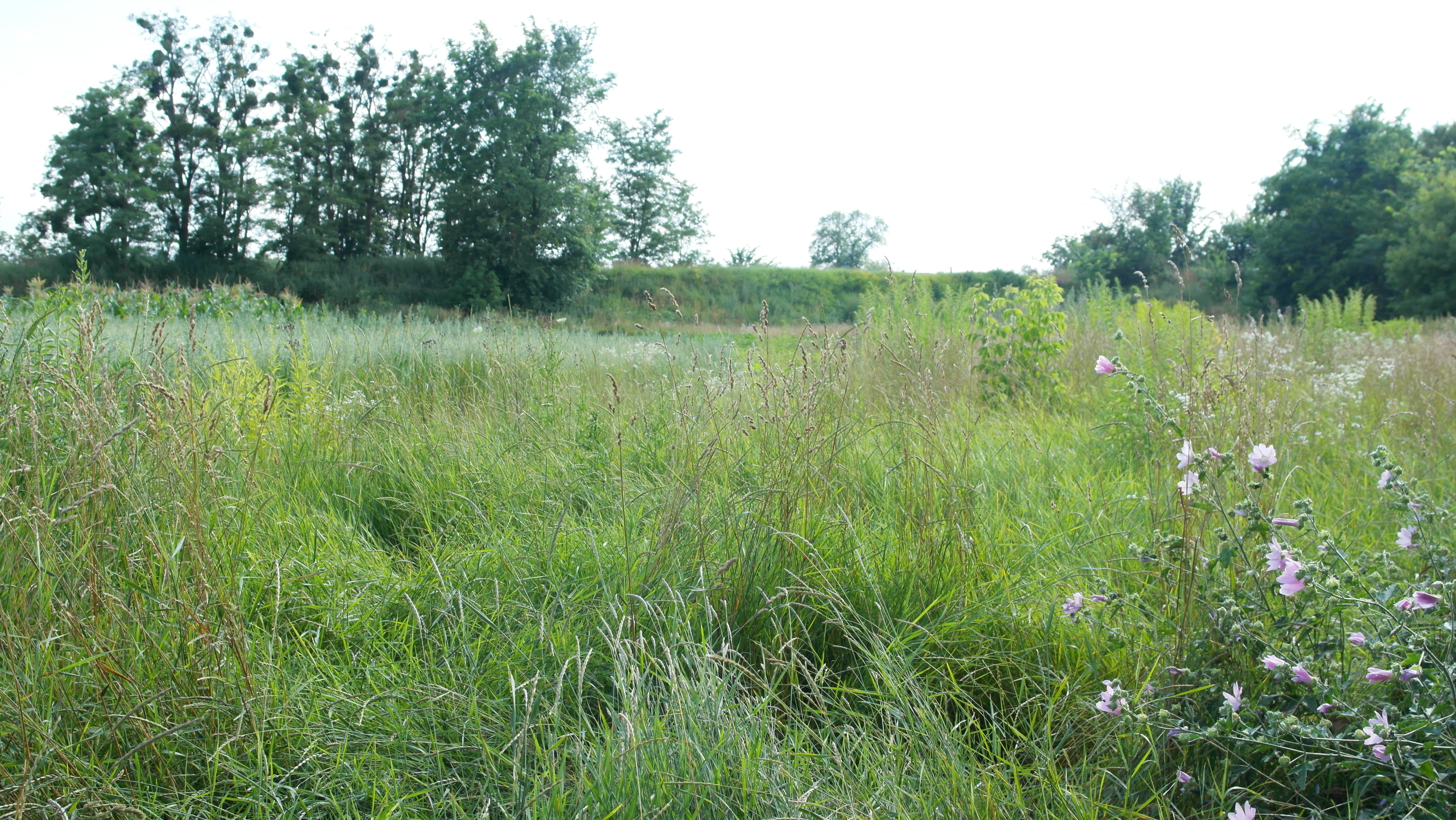 Городище (літописний Мутижир), с. Мотижин, Зх частина села на підвищеному краю ставка